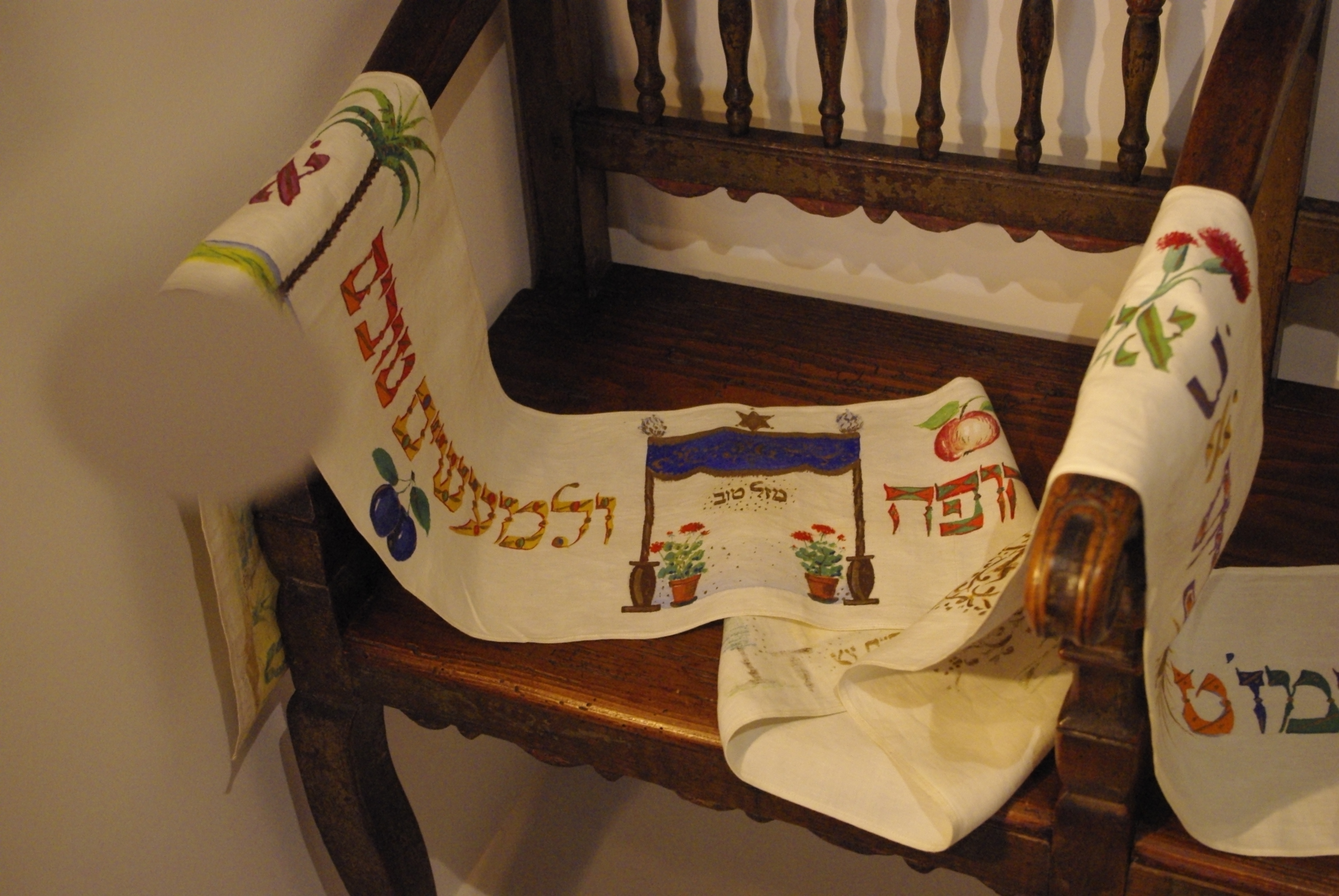 Mappah - lange de circoncision - musée alsacien de Strasbourg (Alsace - XXe siècle)